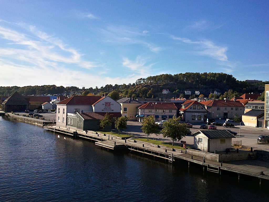 Elva Tista